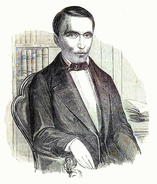 Irinarch Ivanovič Vvedenskij (1813-1855), promotore di un circolo politico frequentato da Nikolaj Černyševskij, e traduttore russo di Charles Dickens